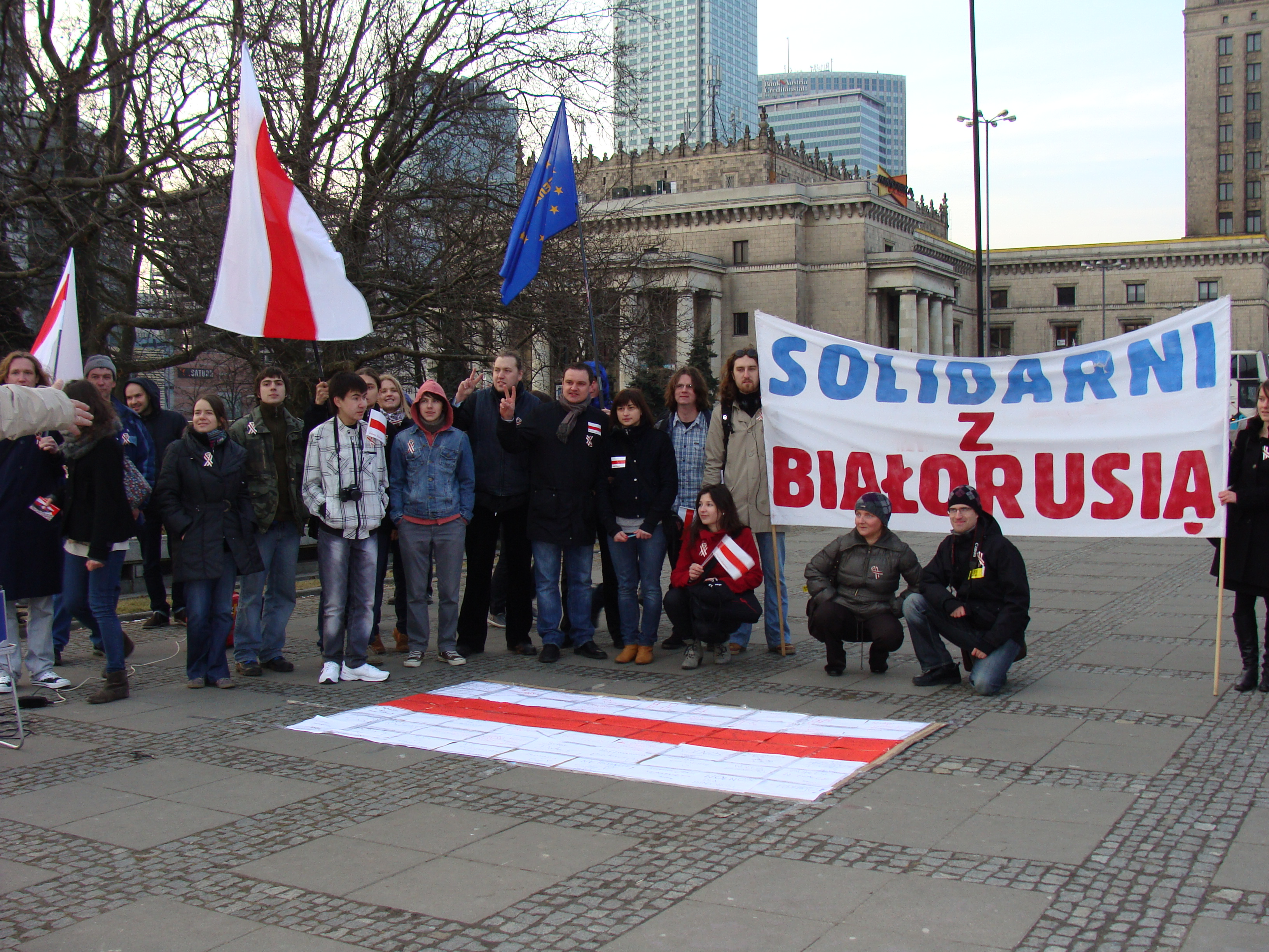 Dzień Solidarności z Białorusią. Wśród uczestników byli stypendyści Programu Stypendialnego im. Konstantego Kalinowskiego, aktywiści "Europejskiej Białorusi" i Inicjatywy Wolna Białoruś. Akcja odbyła się pod Pałacem Kultury i Nauki w Warszawie od strony Alej Jerozolimskich. 16 marca 2011 r.